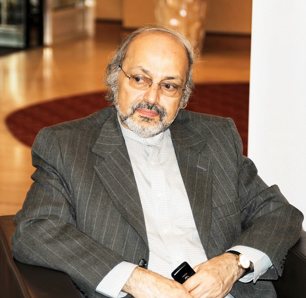 Alireza Sheikh Attar